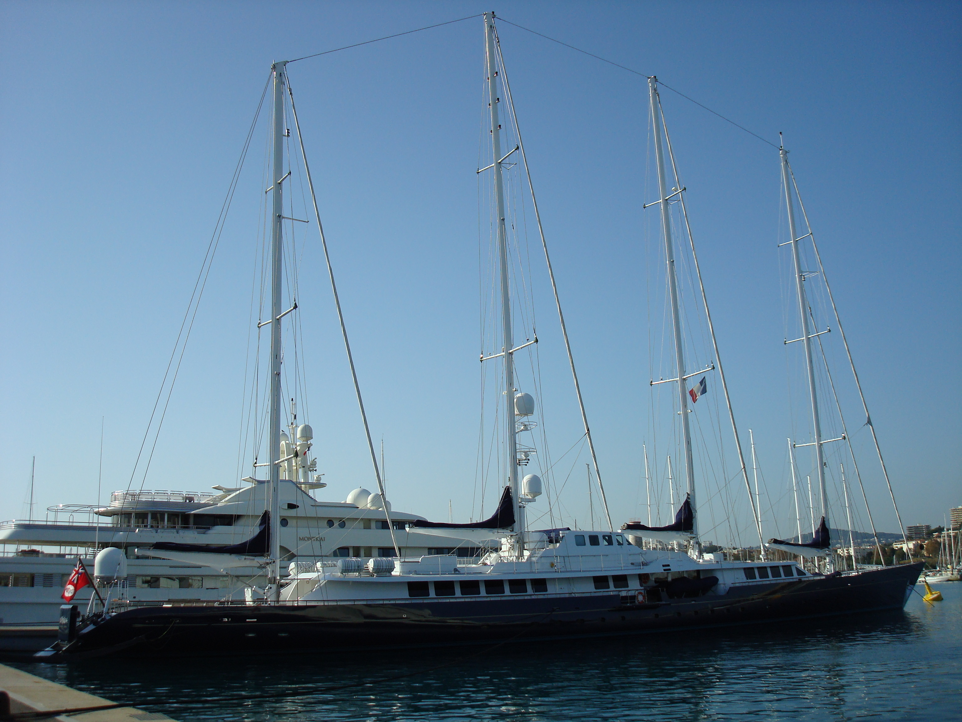 Phocea au port d'Antibes